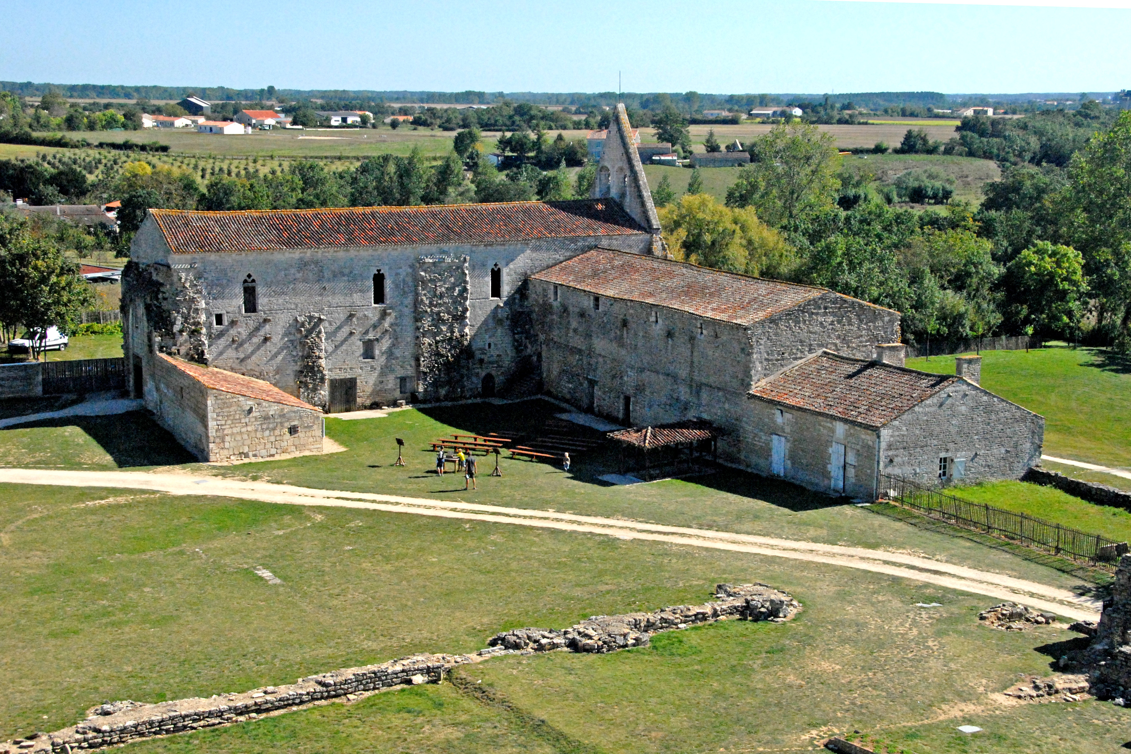 Maillezais, Hotel/Konvent v.Südturm